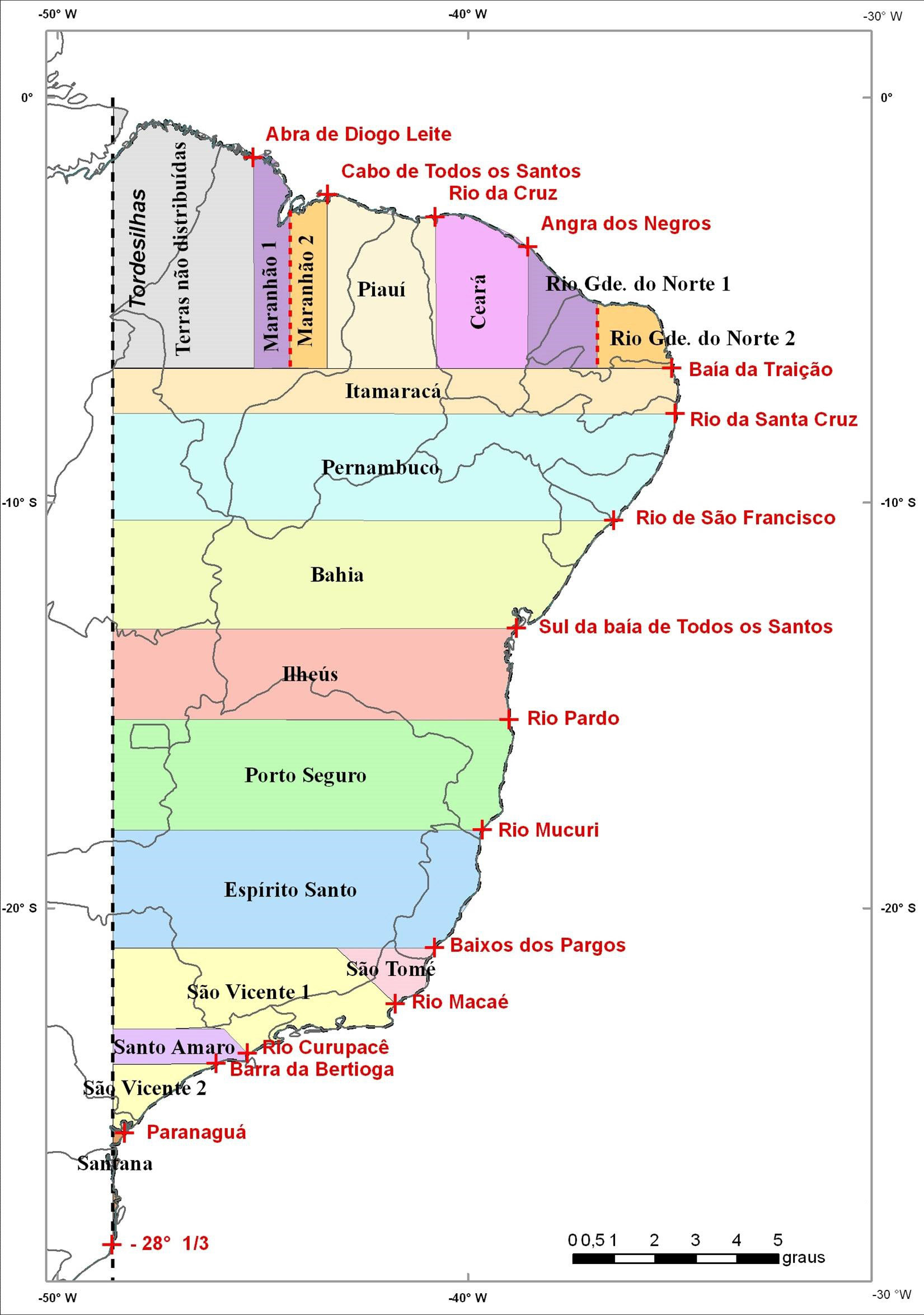 Mapa das capitanias hereditária